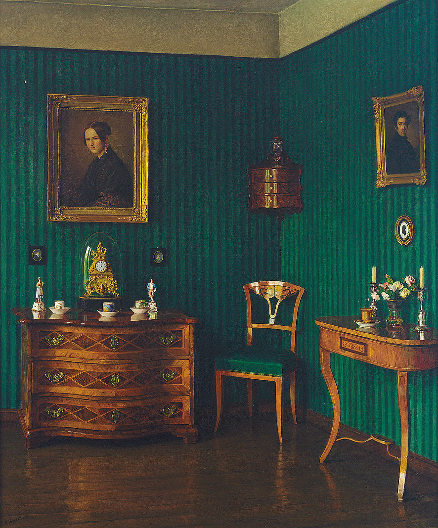 Biedermeiersalon, Öl auf Leinwand; 90 x 77,5 cm